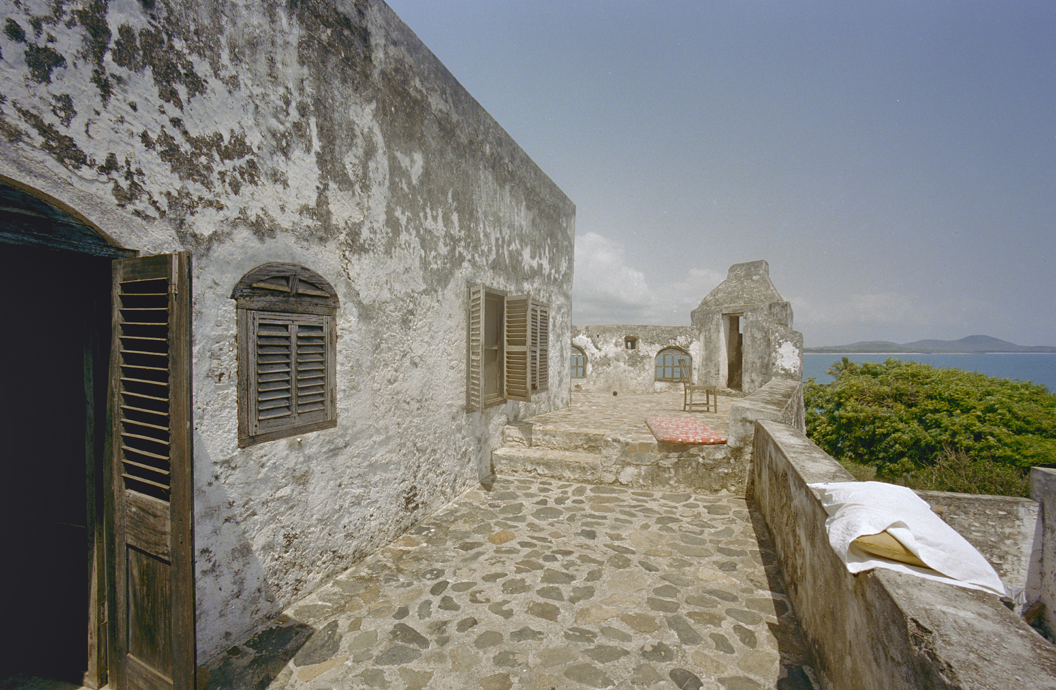 Fort Patience: Overzicht achterzijde vanaf buitenmuur (opmerking: Ghana reis Loek Tangel)